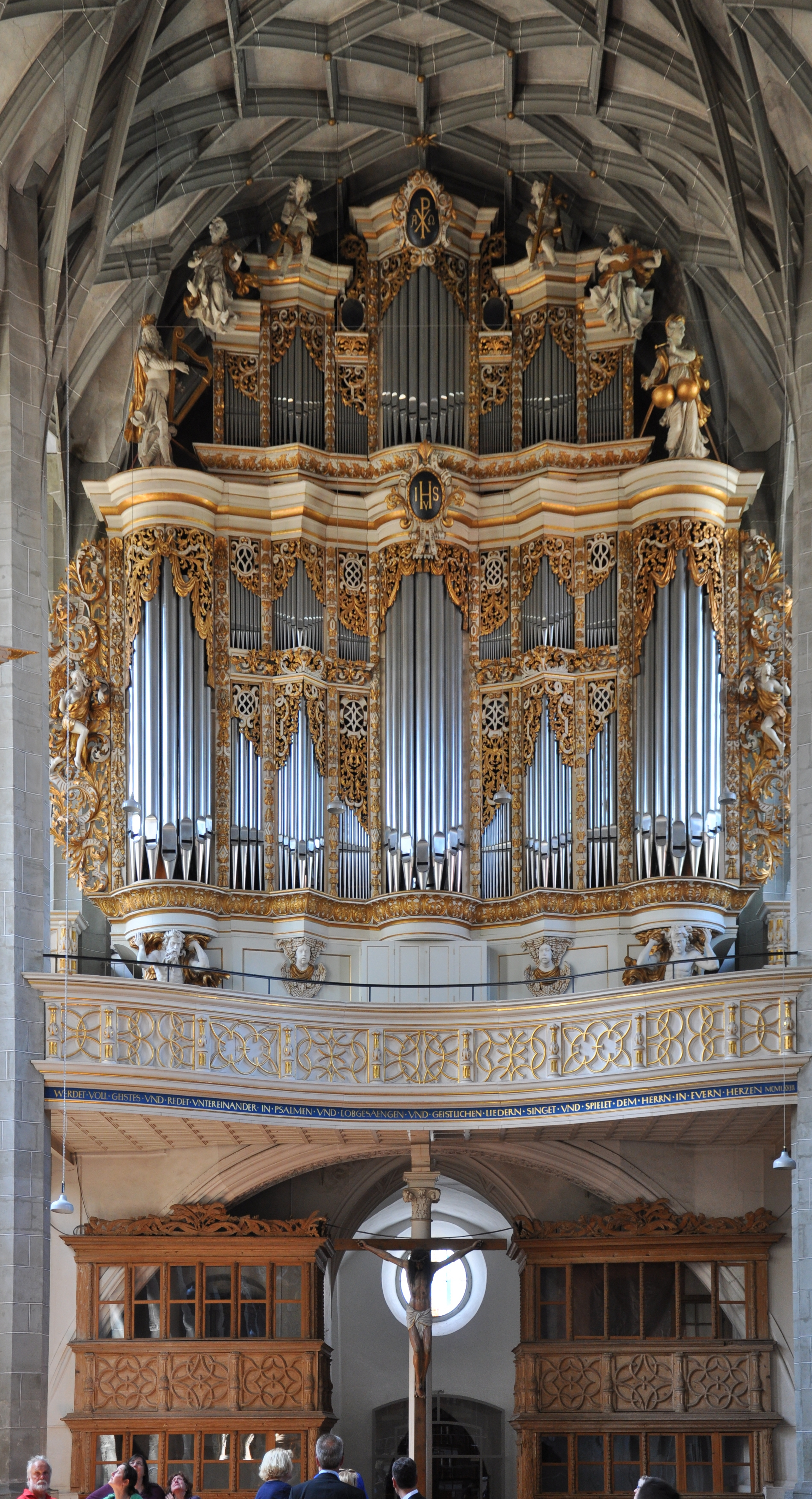 Halle (Saale), Marktkirche